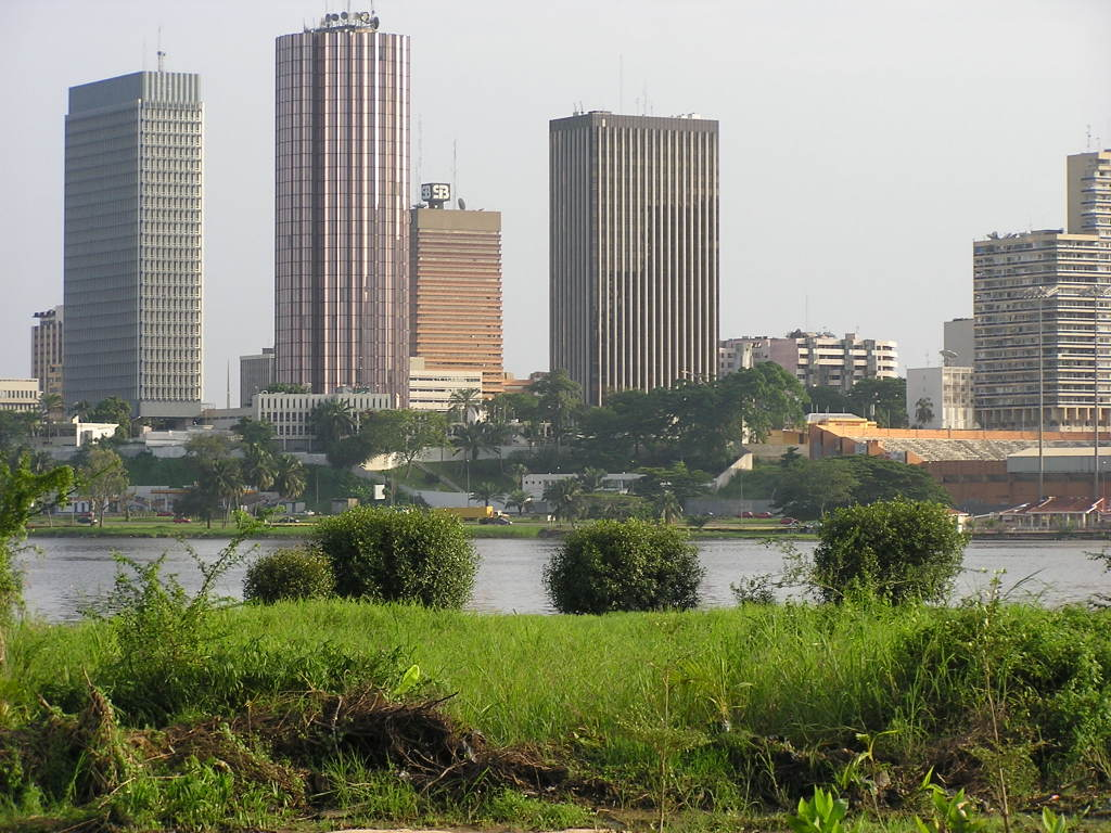 Vue des tours du centre-est du Plateau, à Abidjan en juin 2004.